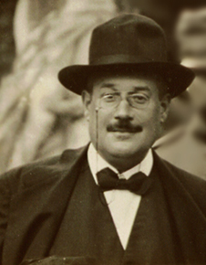 Alfredo Melli nel 1916